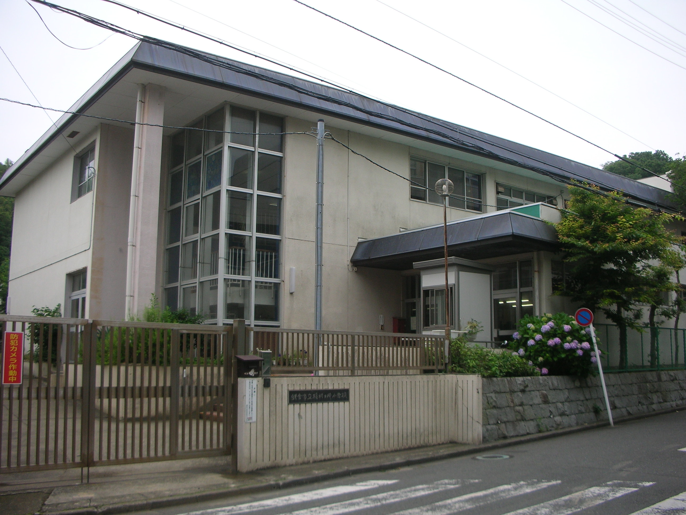 鎌倉市立稲村ヶ崎小学校